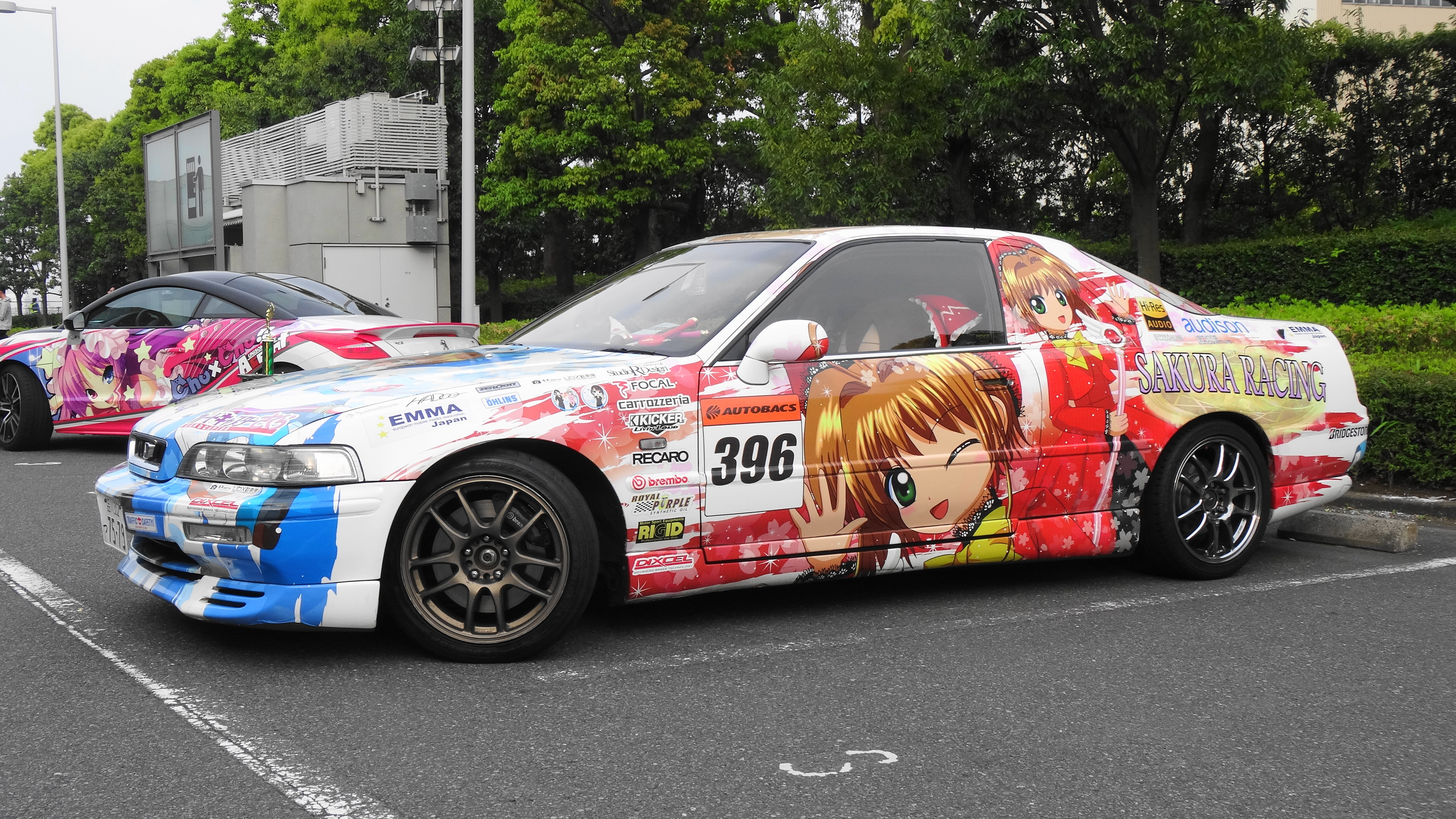 『カードキャプターさくら』木之本桜のHonda Legend coupe痛車。中文（台灣）: 《庫洛魔法使》木之本櫻的Honda Legend coupe痛車。